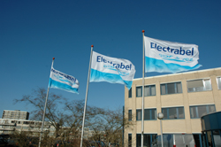 Hoofdkantoor Electrabel Nederland in Zwolle